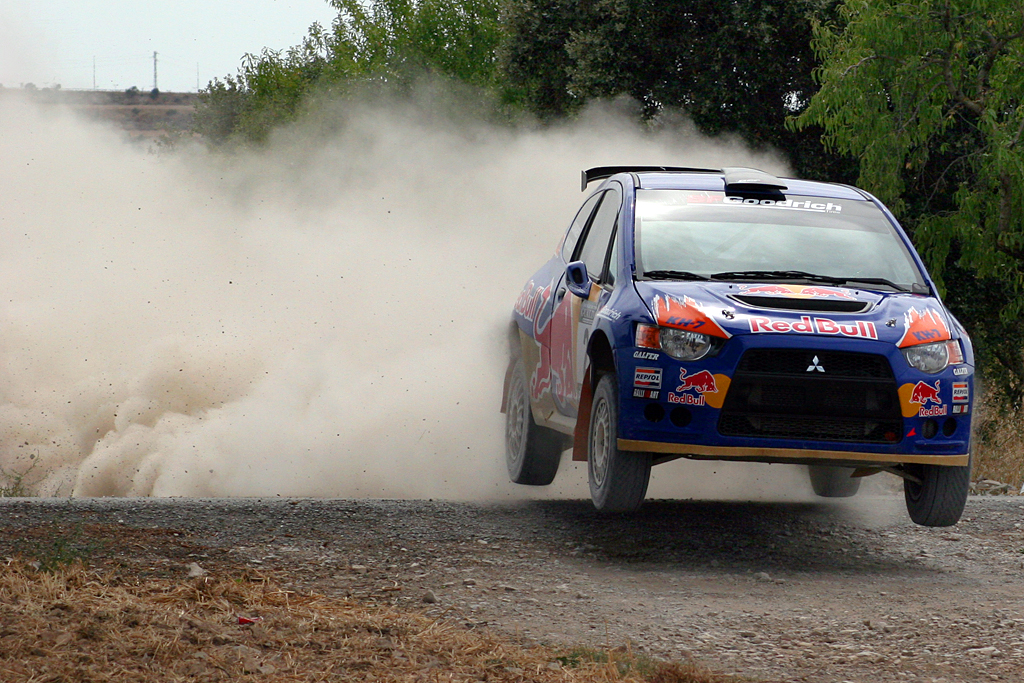 Nani Roma con Mitsubishi Colt en Rally de Terra Ciutat de Cervera 2010